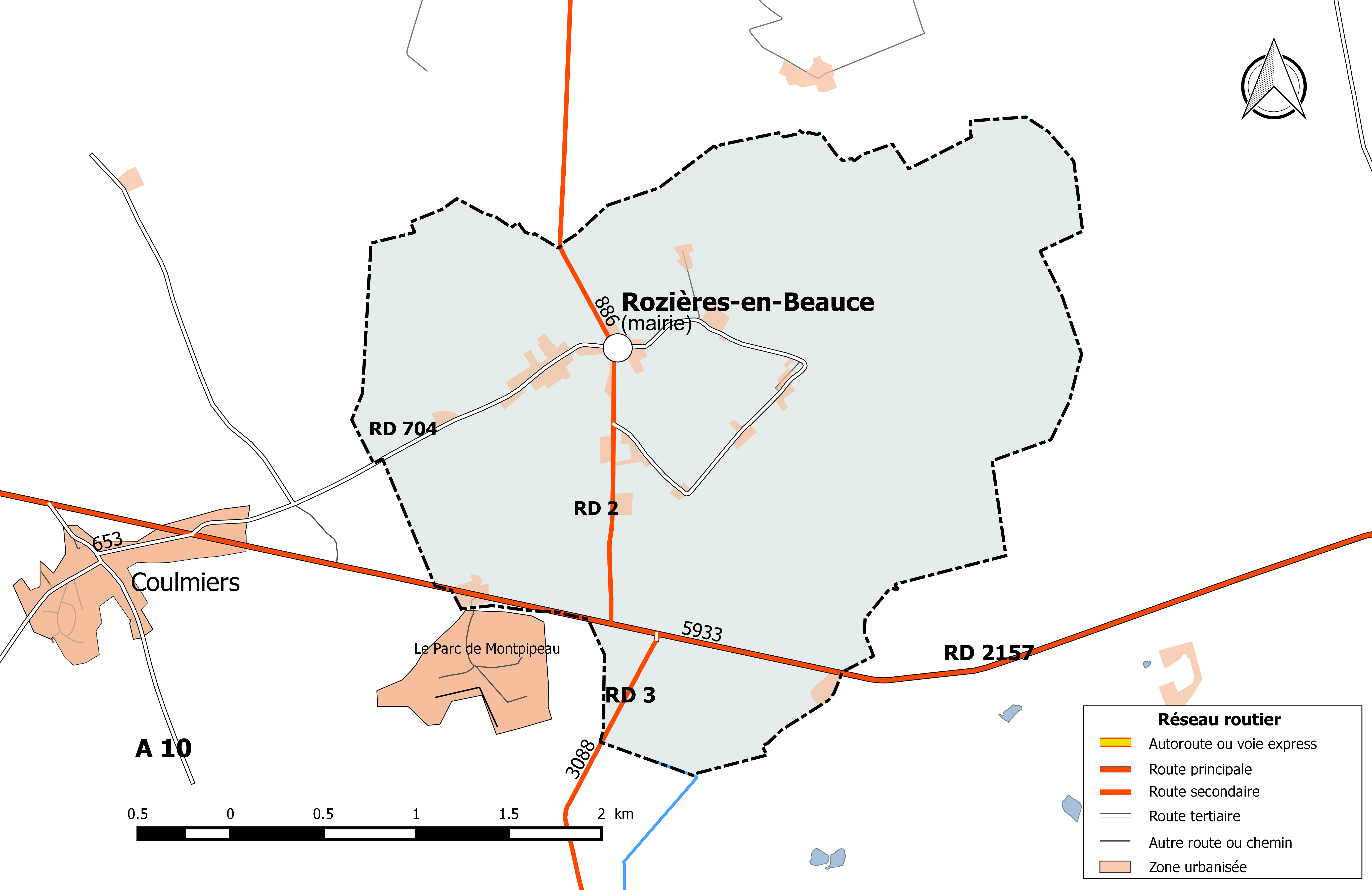 Carte du réseau routier de la commune de Rozières-en-Beauce.